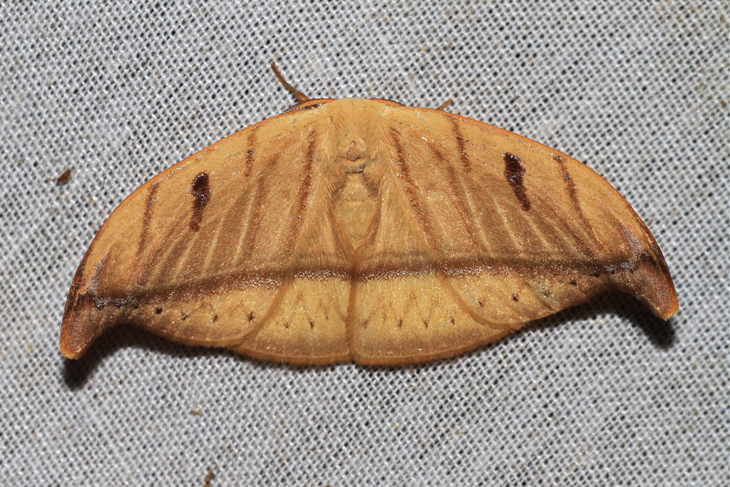 Серпокрылка Callidrepana argenteola